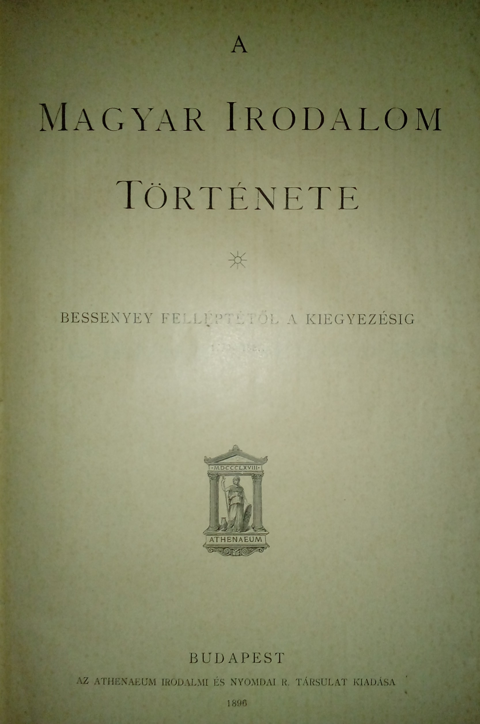 Beöthy Zsolt és Badics Ferenc által szerkesztett: A magyar irodalom története